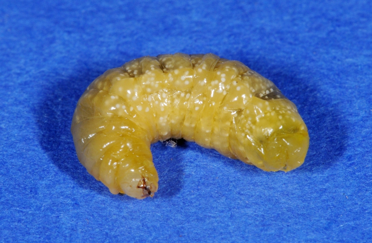 Larve von Sceliphron curvatum, Wiesbaden, Hessen, Deutschland